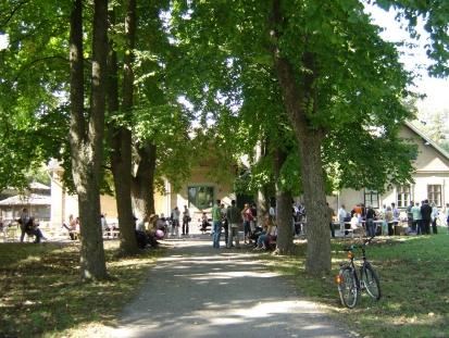 Zlatna Greda, naselje u Baranji